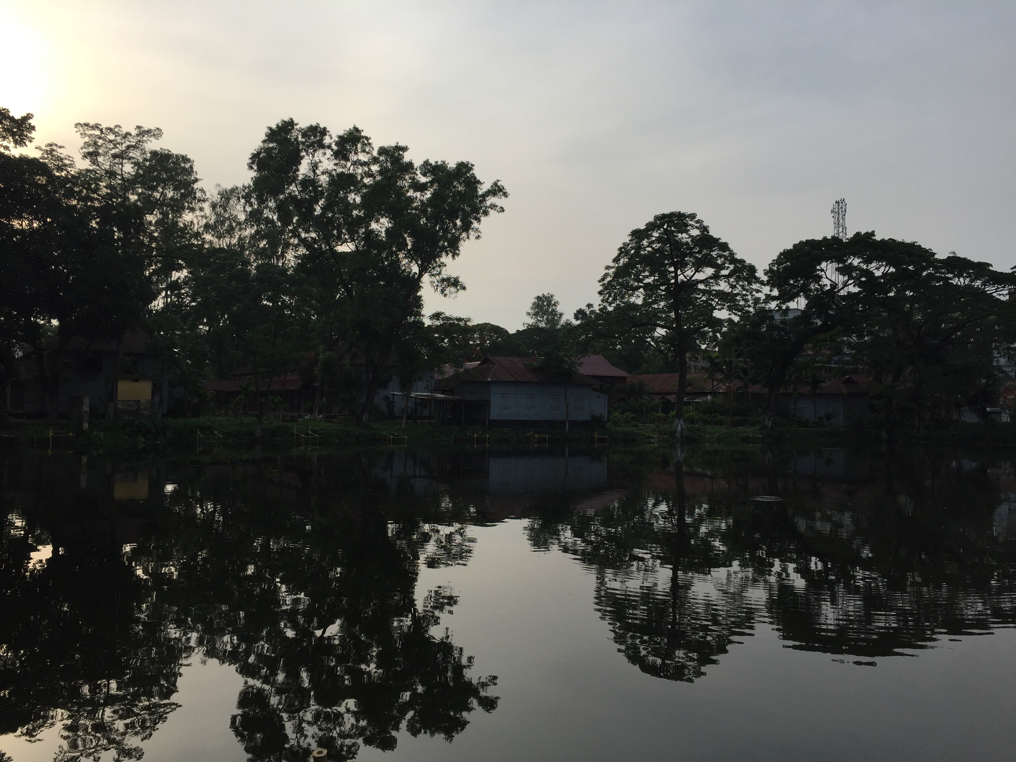 পুকুরের অপর প্রান্ত থেকে বিদ্যালয়